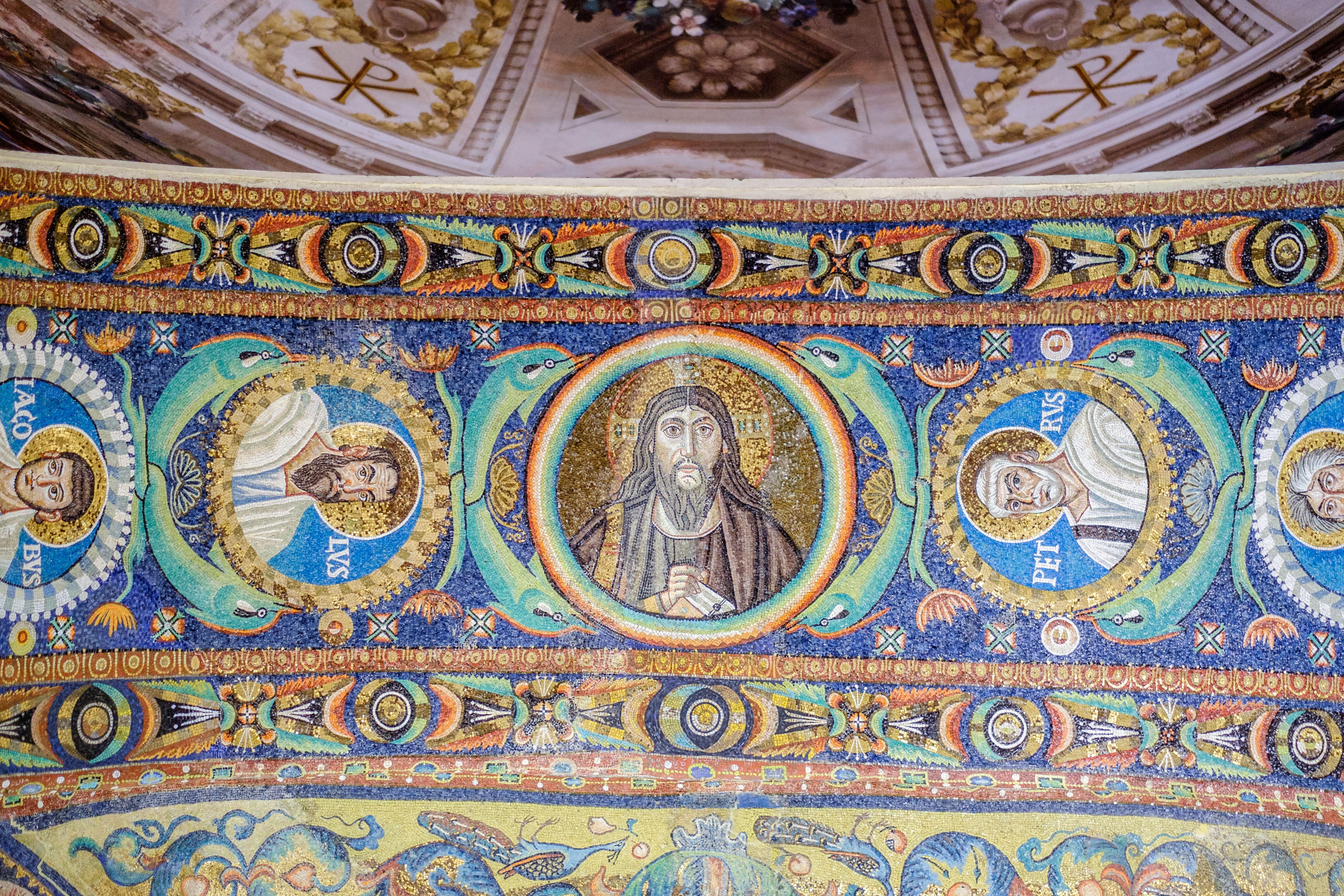 Ravenna